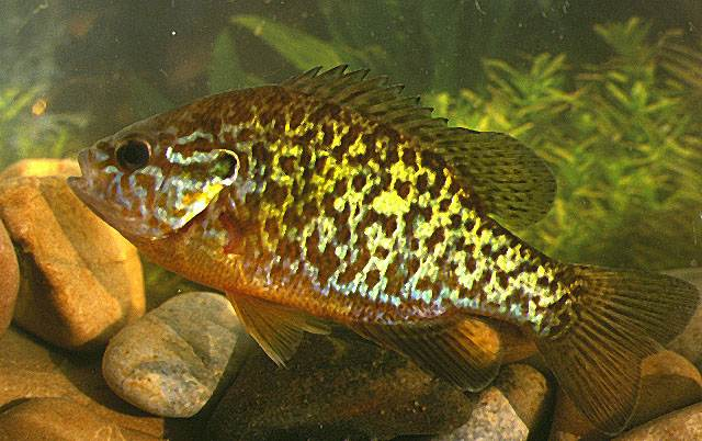 perche soleil